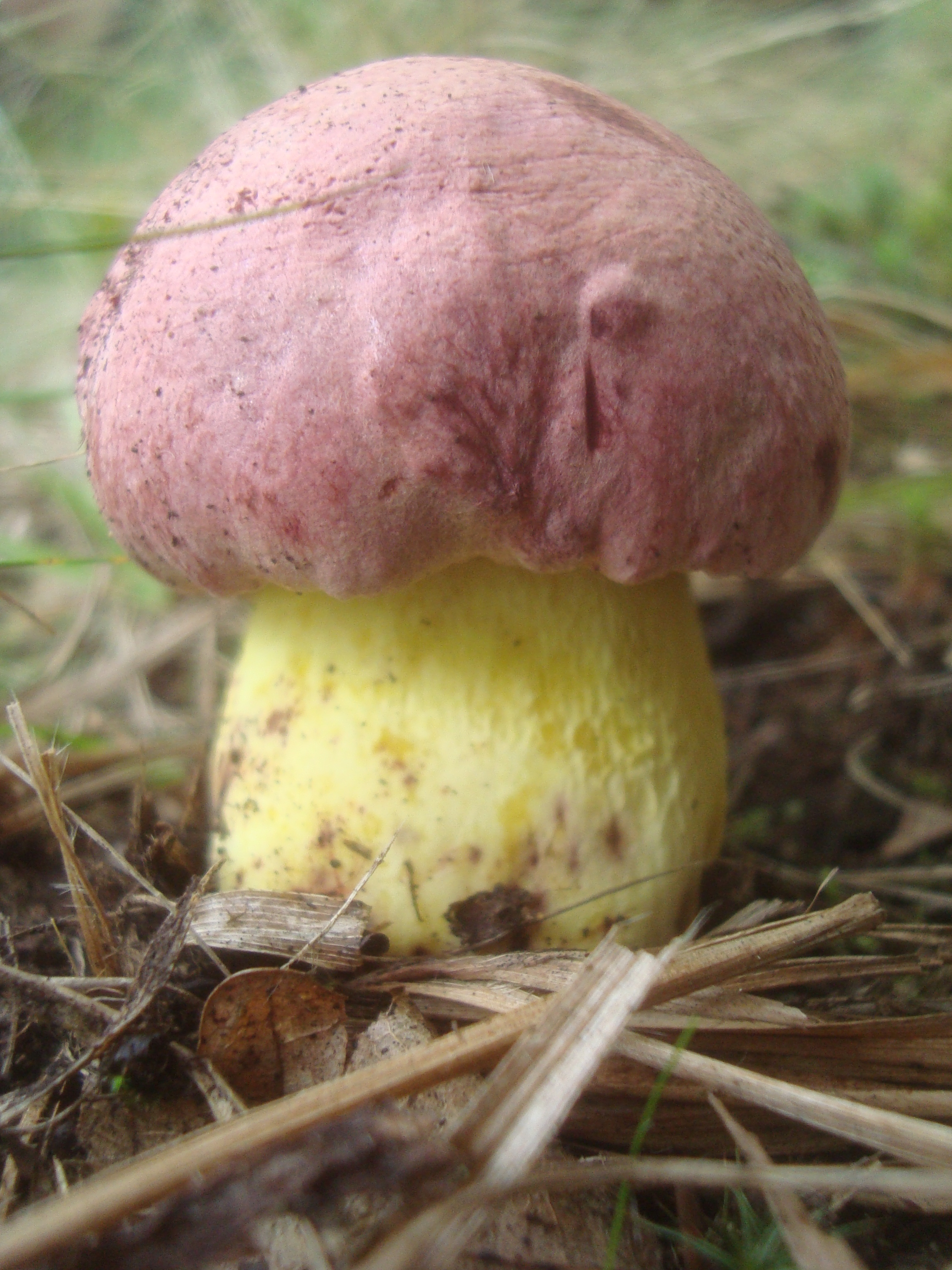 Houba z Podkomorských lesů, Česká republika, jižní Morava